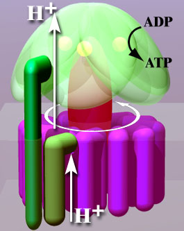 Funktionsprinzip ATP-Synthase, Drehbewegung